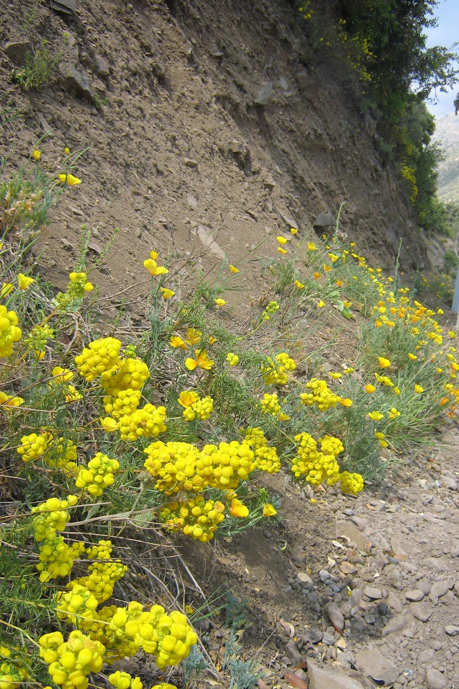 Calceolaria pinnifolia, high montain, Central Chile, Disputada